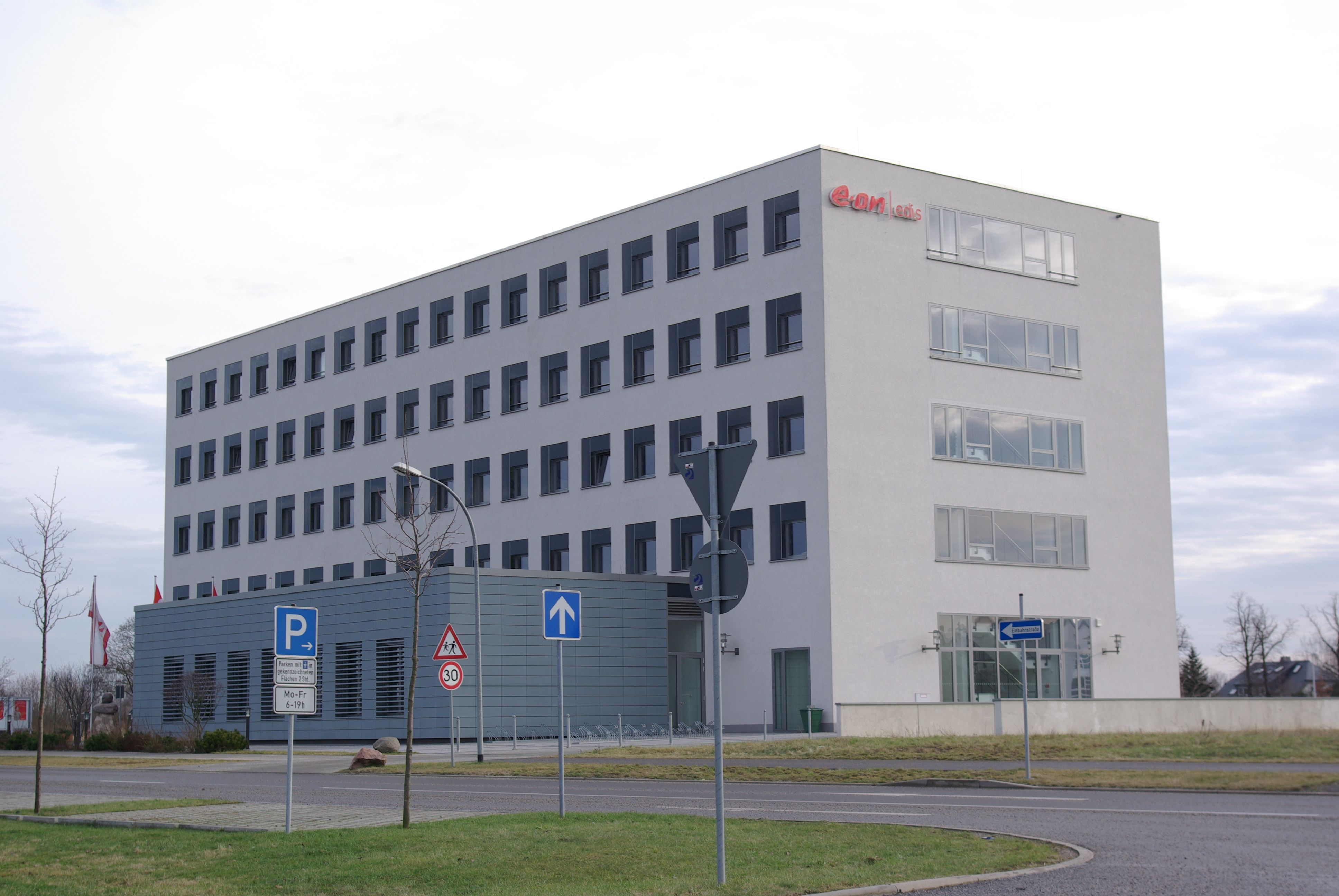 Deutschland, Brandenburg, Schönefeld, das neue Rathaus